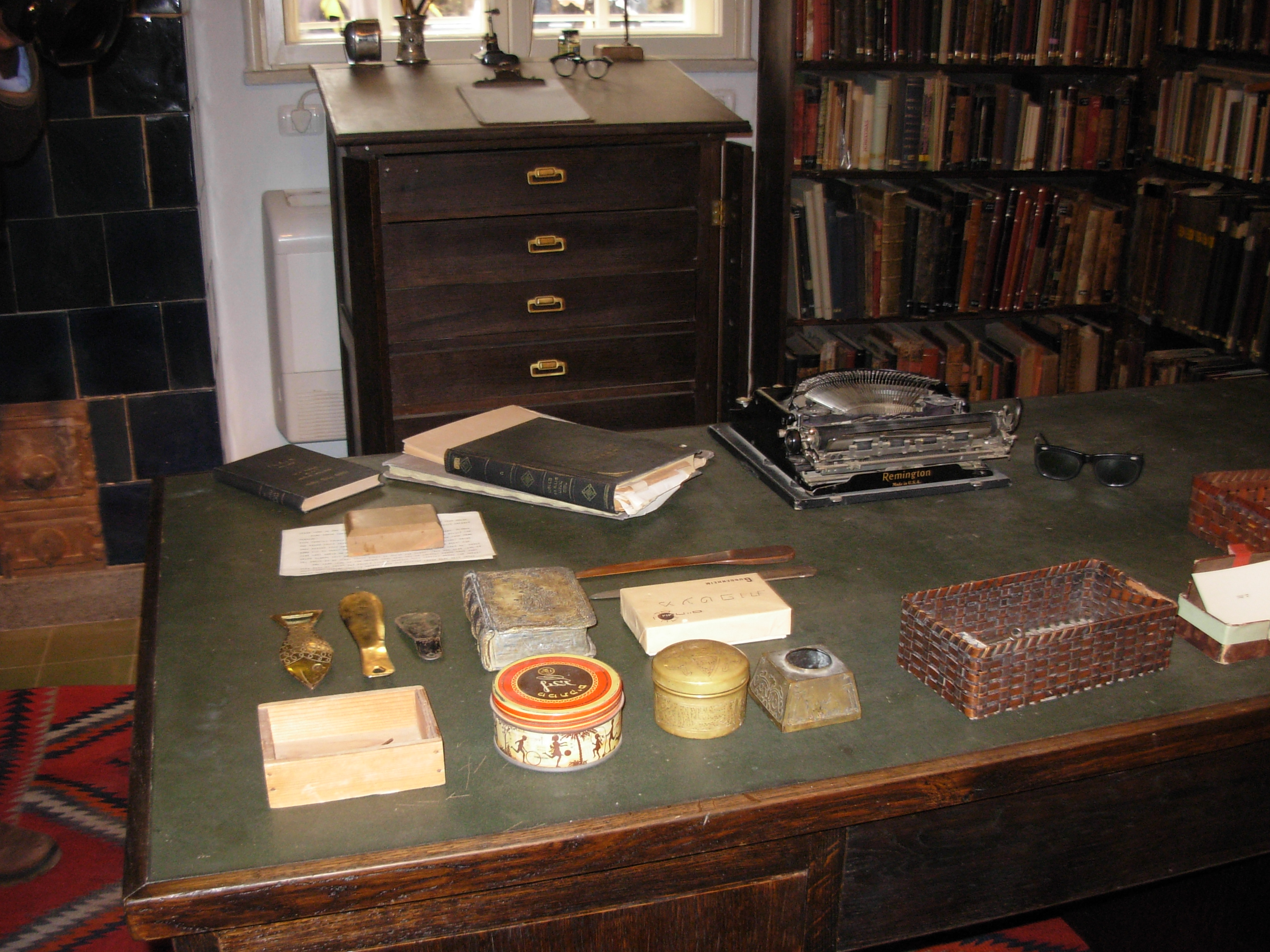 בית עגנון הוא הבית שבו התגורר הסופר ש"י עגנון, בשכונת תלפיות בירושלים, ברחוב קלוזנר 16. לבית מראה מבצרי וסגור, חלונות הברזל מסורגים. הוא בנוי בסגנון מודרני, בקוים ישרים ובמראה קובייתי, ומצופה בטיח. בבית נמצא כיום מוזיאון "בית עגנון בירושלים".